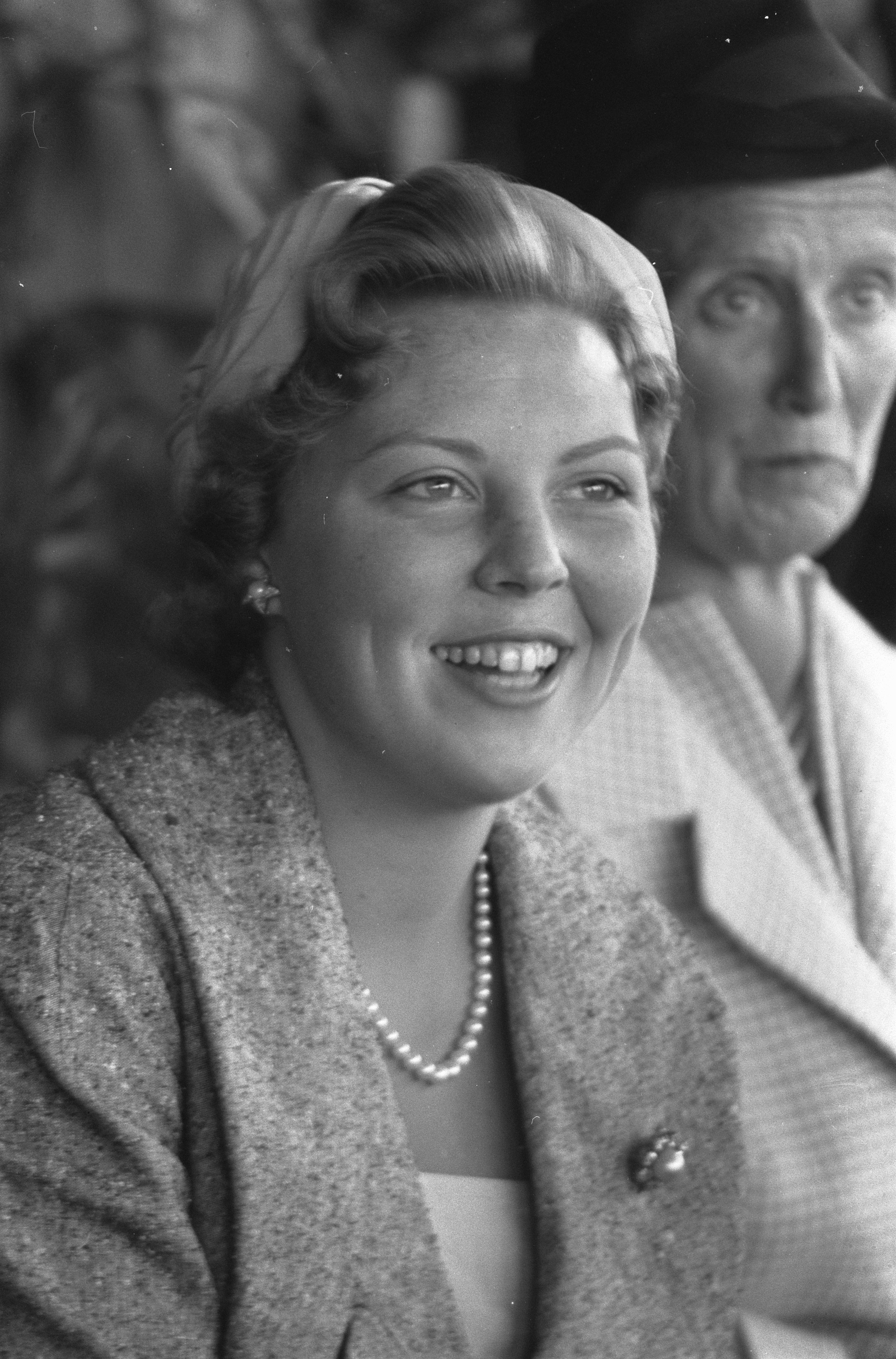 Collectie / Archief : Fotocollectie Anefo Reportage / Serie : [ onbekend ] Beschrijving : Aankomst Hare Koninklijke Hoogheid Prinses Beatrix op Schiphol uit Amerika, Hare Koninklijke Hoogheid Prinses Beatrix / Datum : 22 september 1959 Locatie : Amsterdam, Noord-Holland Trefwoorden : aankomsten, koninginnen Persoonsnaam : Beatrix, prinses Fotograaf : Pot, Harry / Anefo Auteursrechthebbende : Nationaal Archief Materiaalsoort : Negatief (zwart/wit) Nummer archiefinventaris : bekijk toegang 2.24.01.05 Bestanddeelnummer : 910-6945